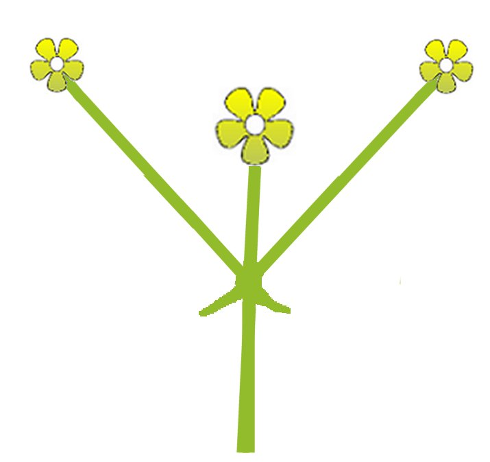 (nl: enkelvoudig gevorkt bijscherm) cyme